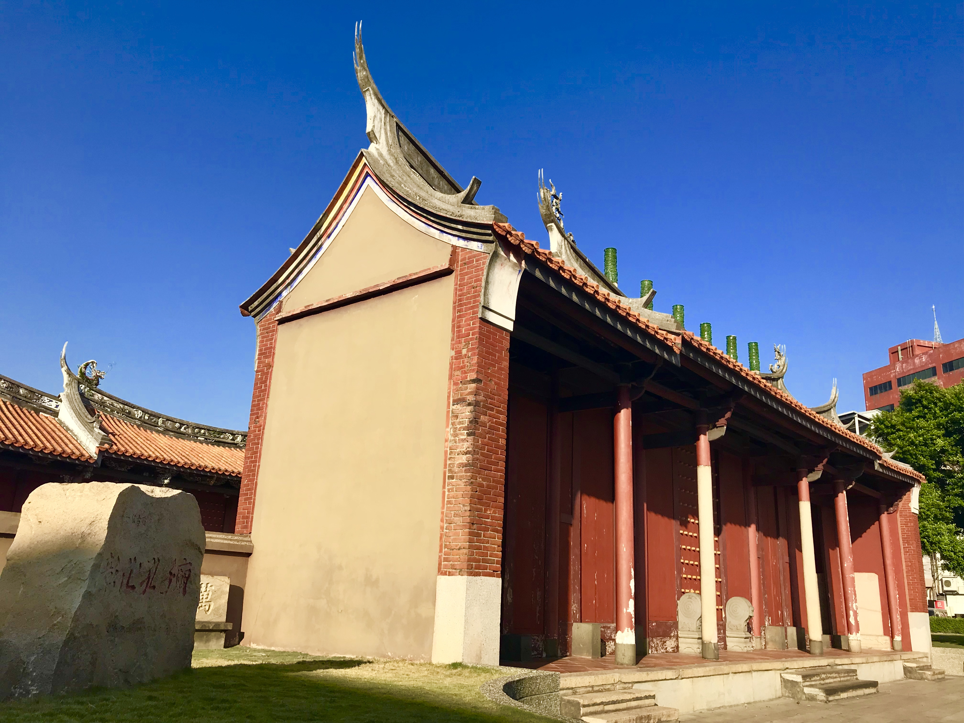 中文（台灣）: 彰化孔子廟地標石與欞星門